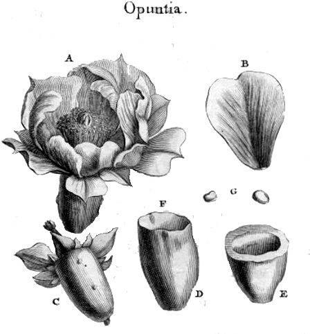 Tafel 122 mit Opuntia in Joseph Pitton de Tourneforts Institutiones Rei Herbariae (Band 2, 1700)